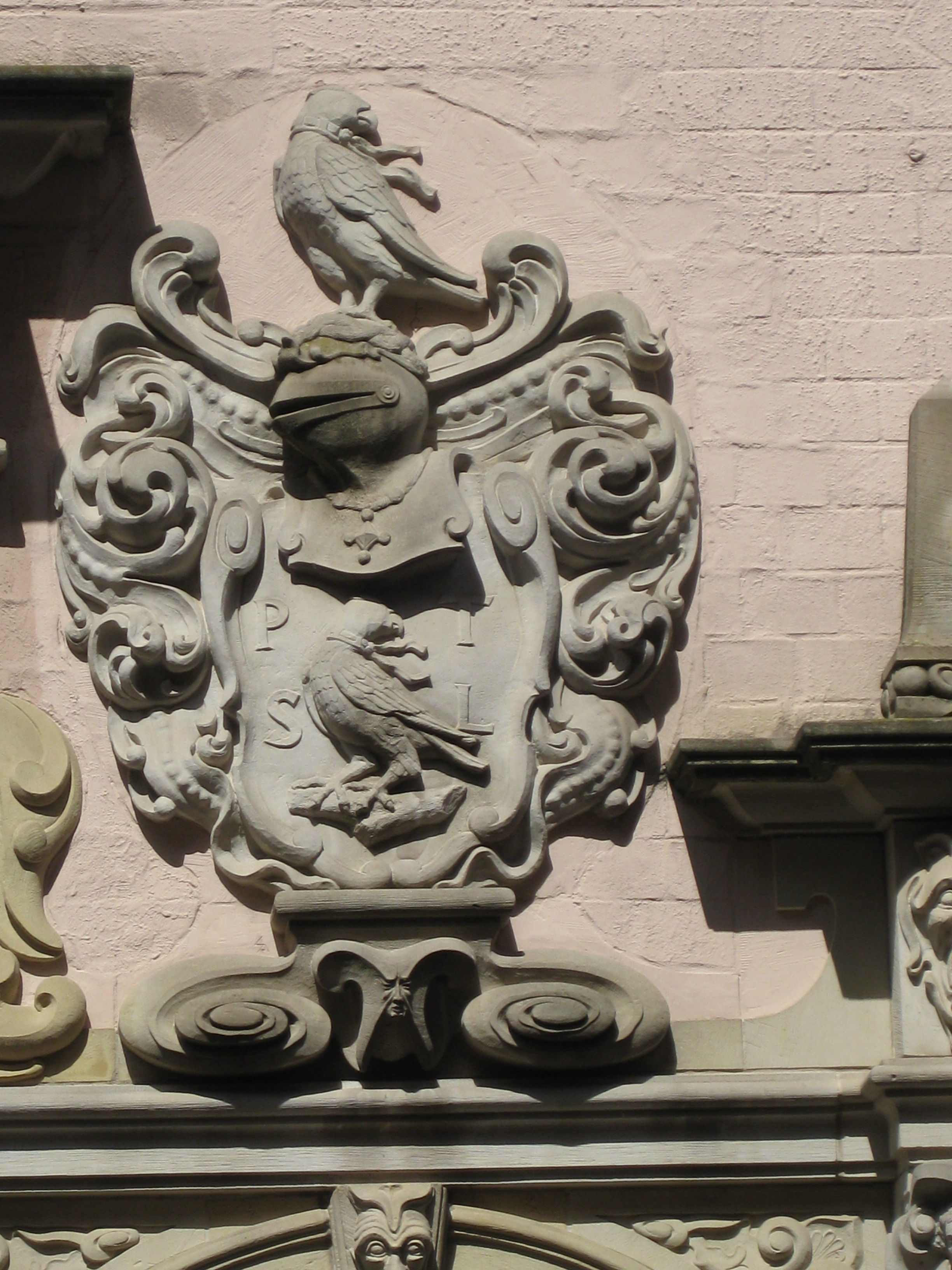 Wappen im Portal des Füchtingshofes in Lübeck.